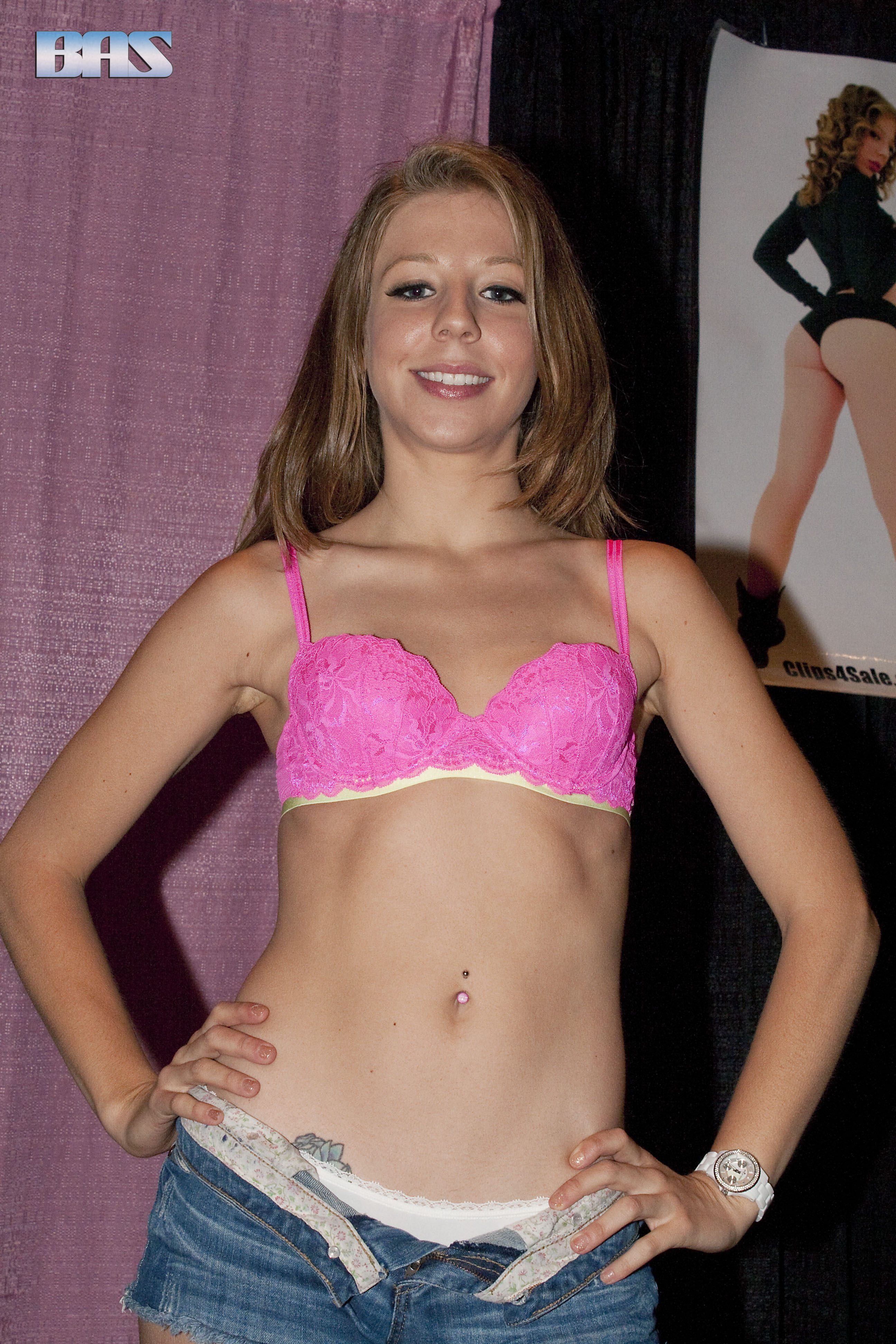 ExxxAC2014_106bas